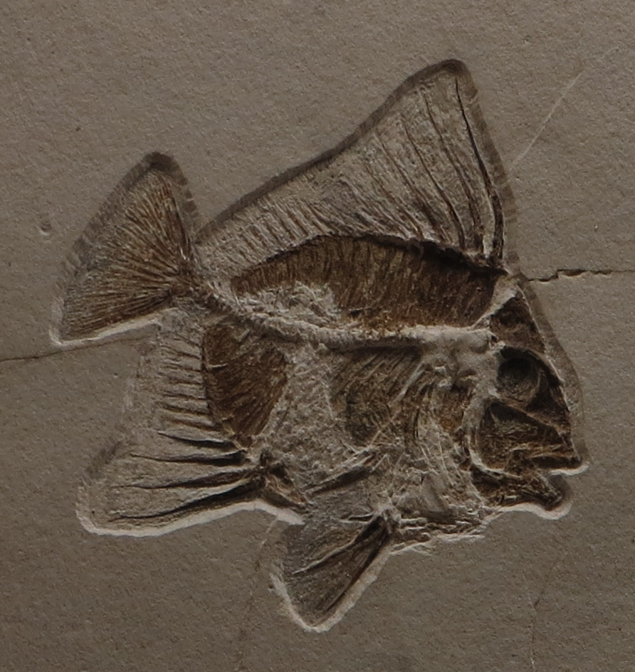 Fossil of Acanthonemus- Museo dei Fossili di Bolca